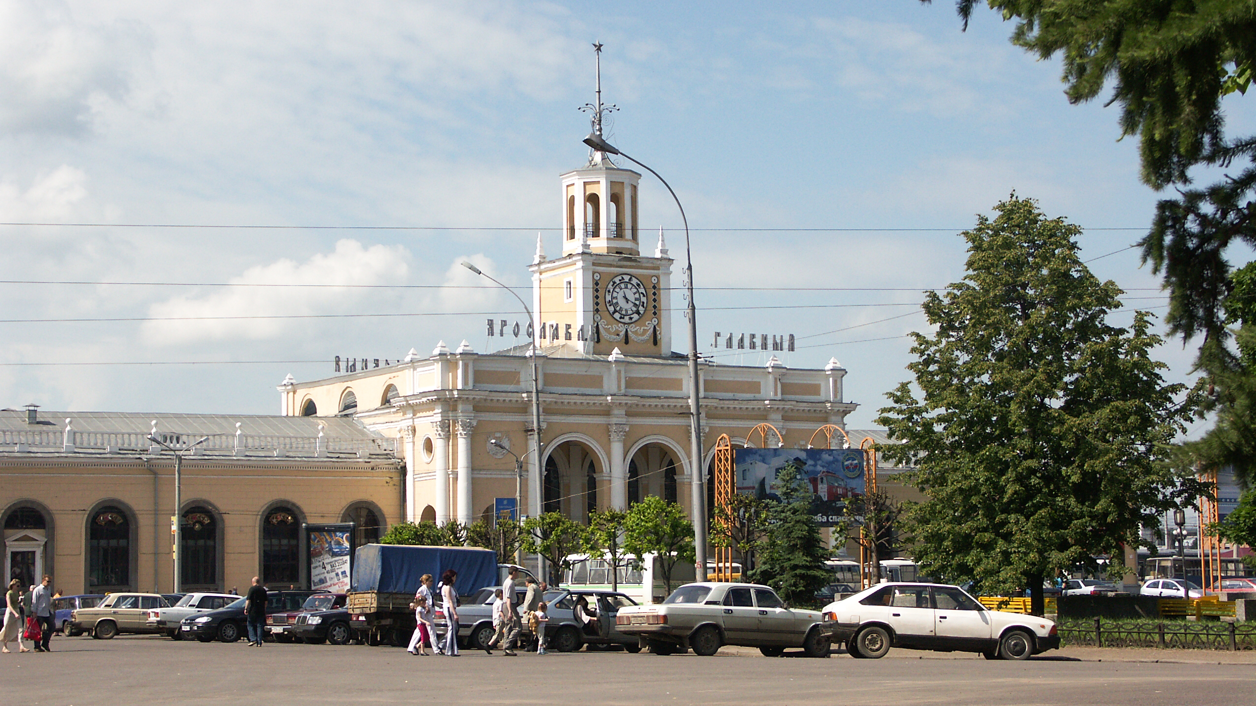 Ярославль-Главный Автор: User:Glaue2dk Дата: 2005-06-13